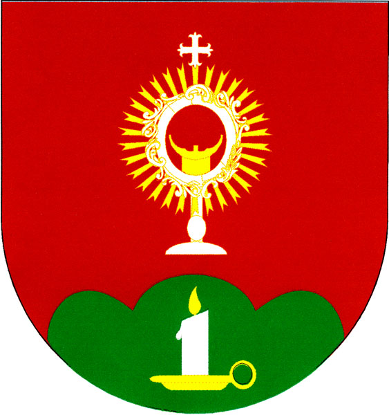 Znak obce Svatoslav v okrese Brno-venkov